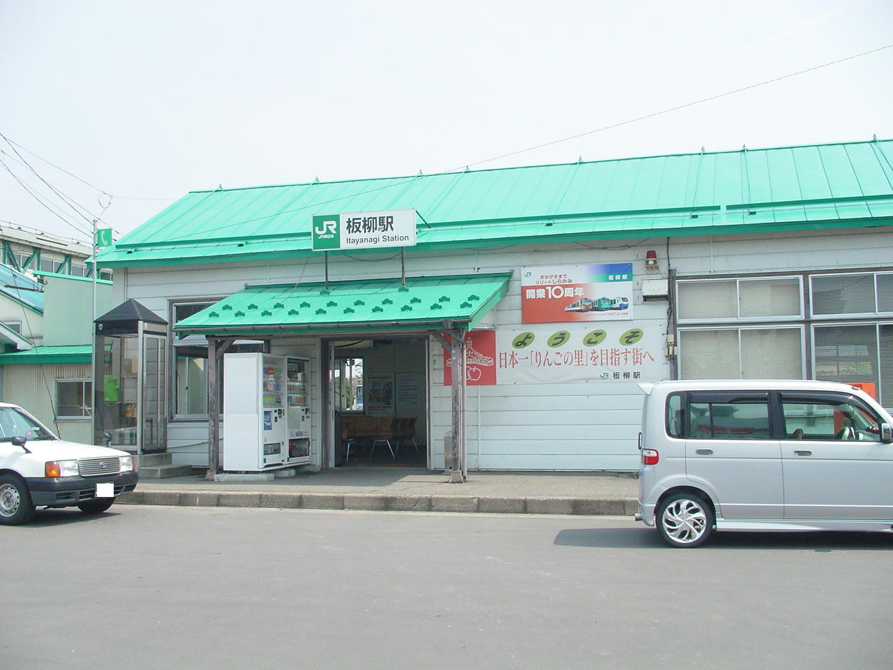 （板柳駅）